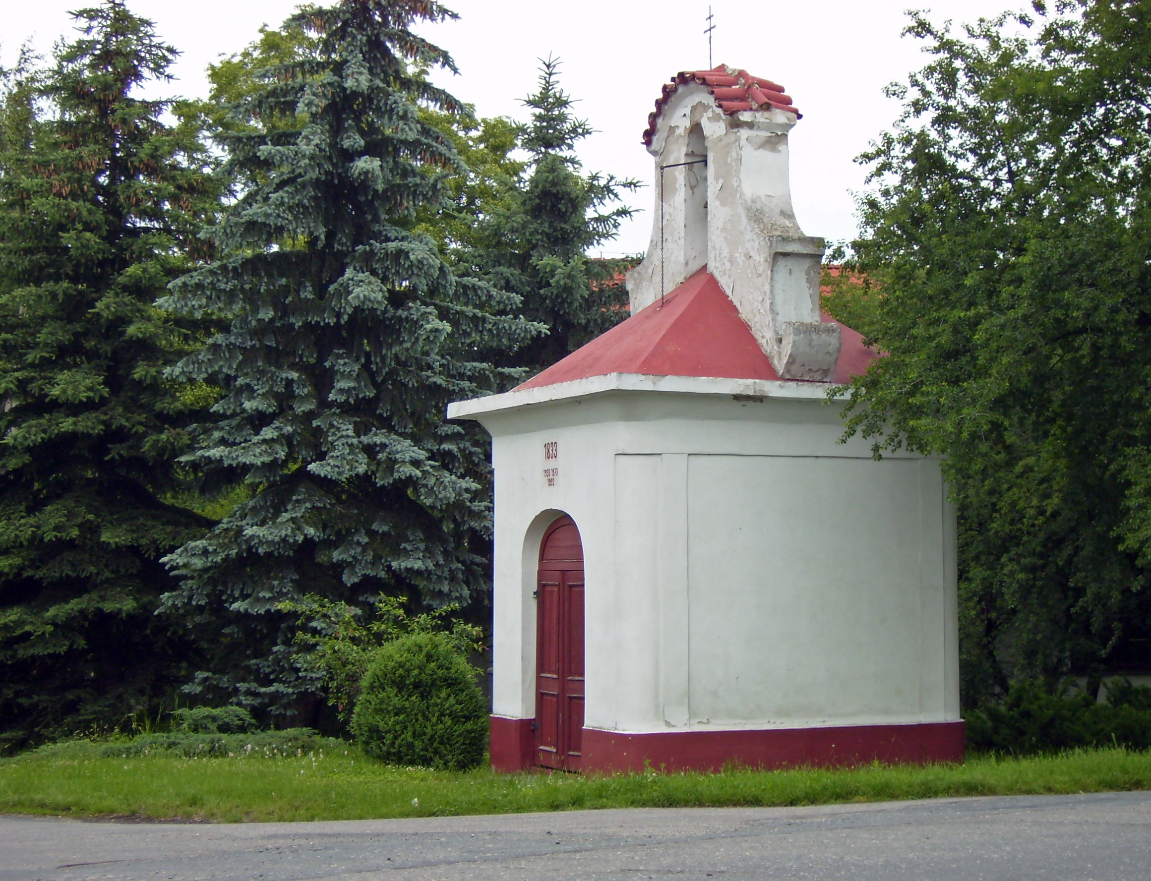 Kaplička ve středočeských Velkých Chvalovicích.